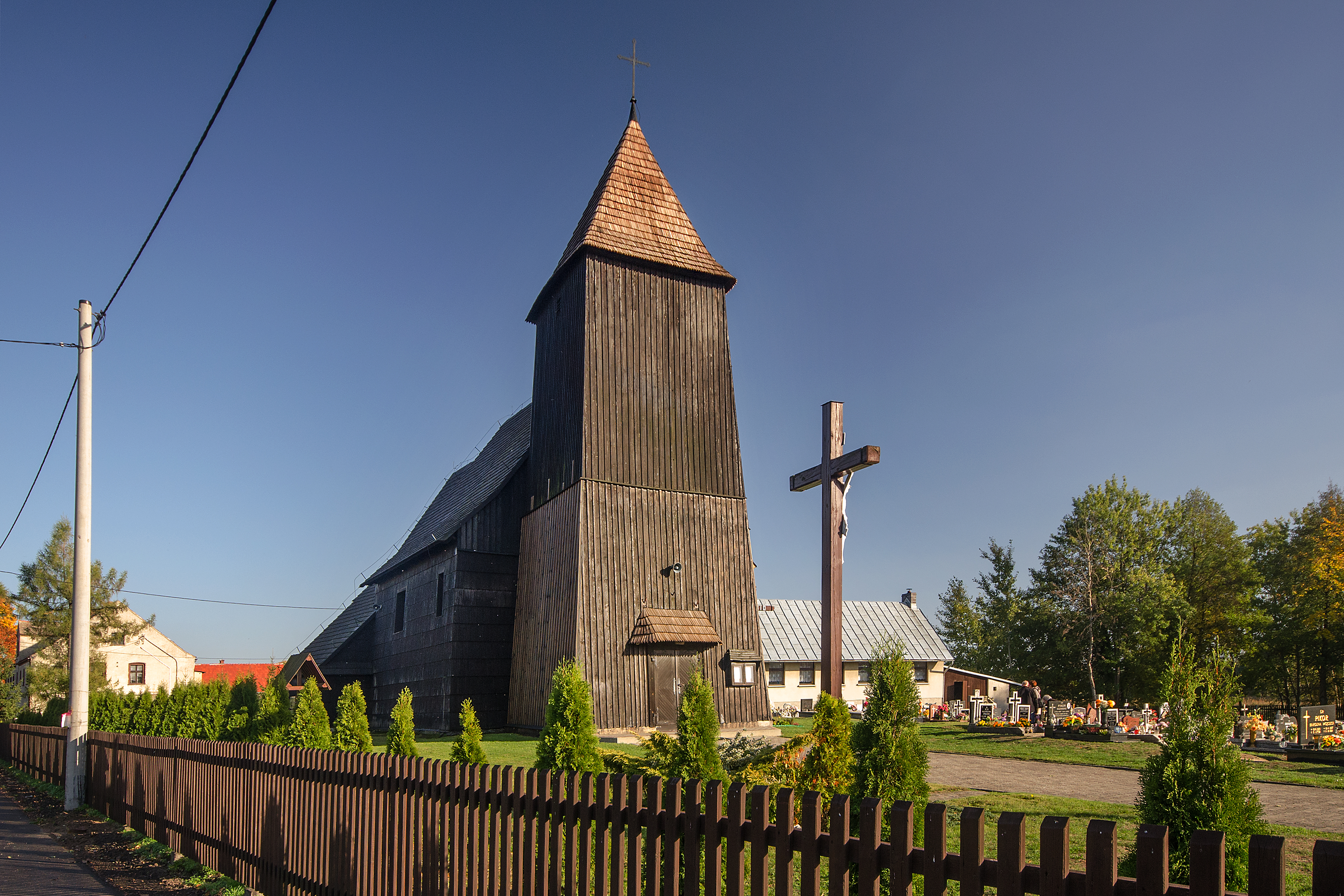 Lasowice Małe, kościół fil. p.w. św. Jakuba, ob. p.w. Wniebowzięcia NMP, 1688, 1735